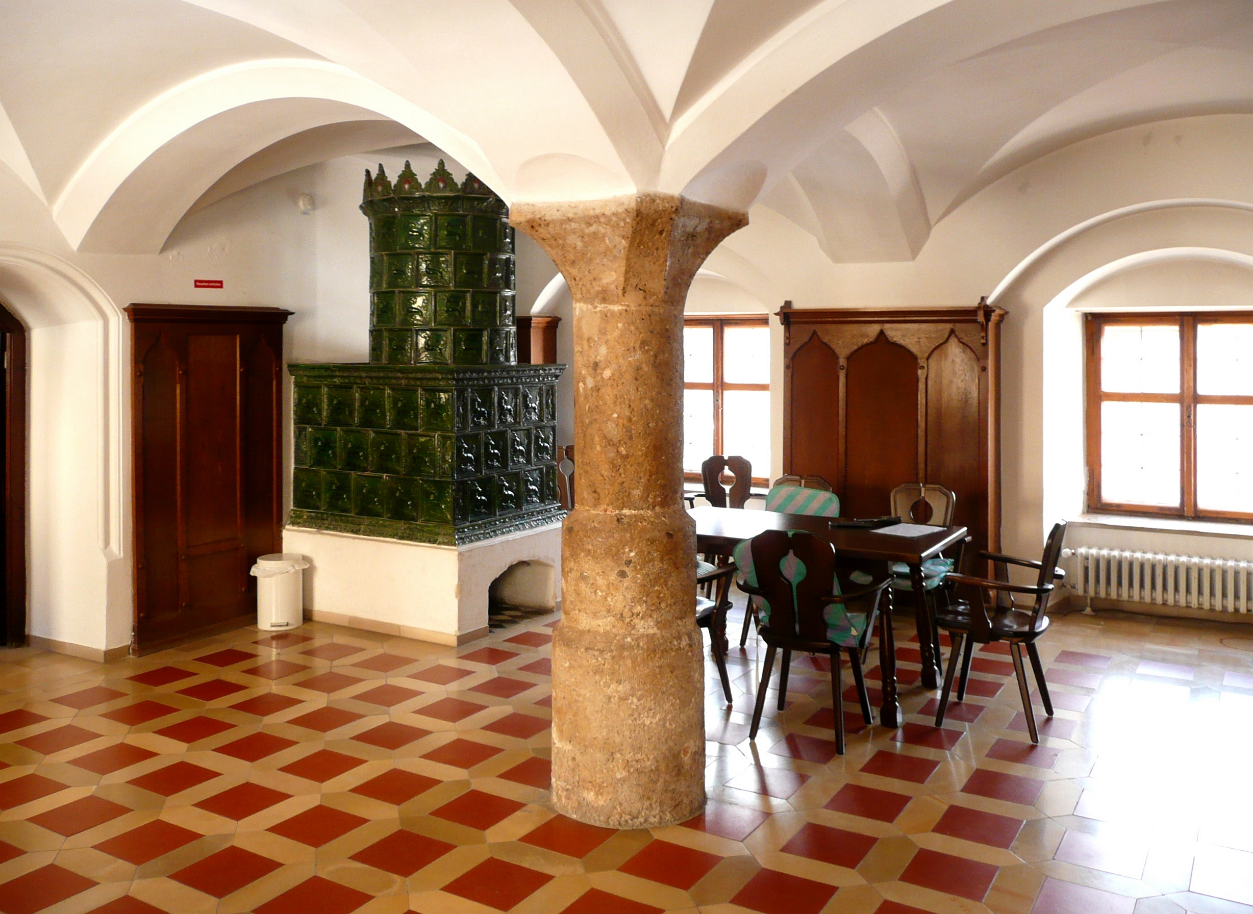 Einer der ehemaligen Wohn- und Essräume der Bedienstenten im historischen Teil.